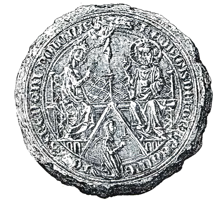 Jadwiga Kaliska seal